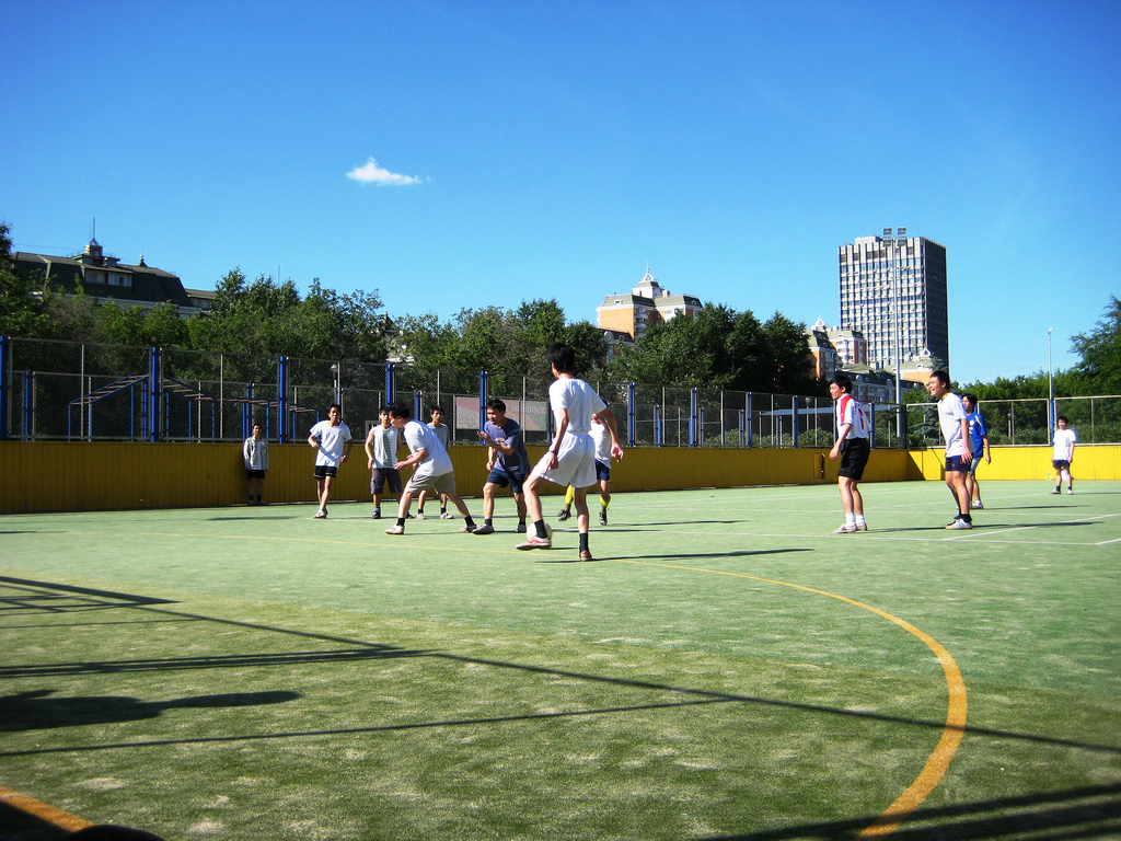 Sân đá bóng trường MGTU Bauman